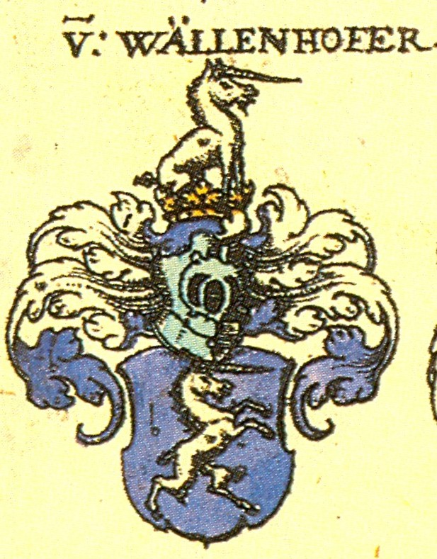 Wappen der Fränkischen Adelsfamilie Wällenhof / Wällenhofer (Waldenfels).